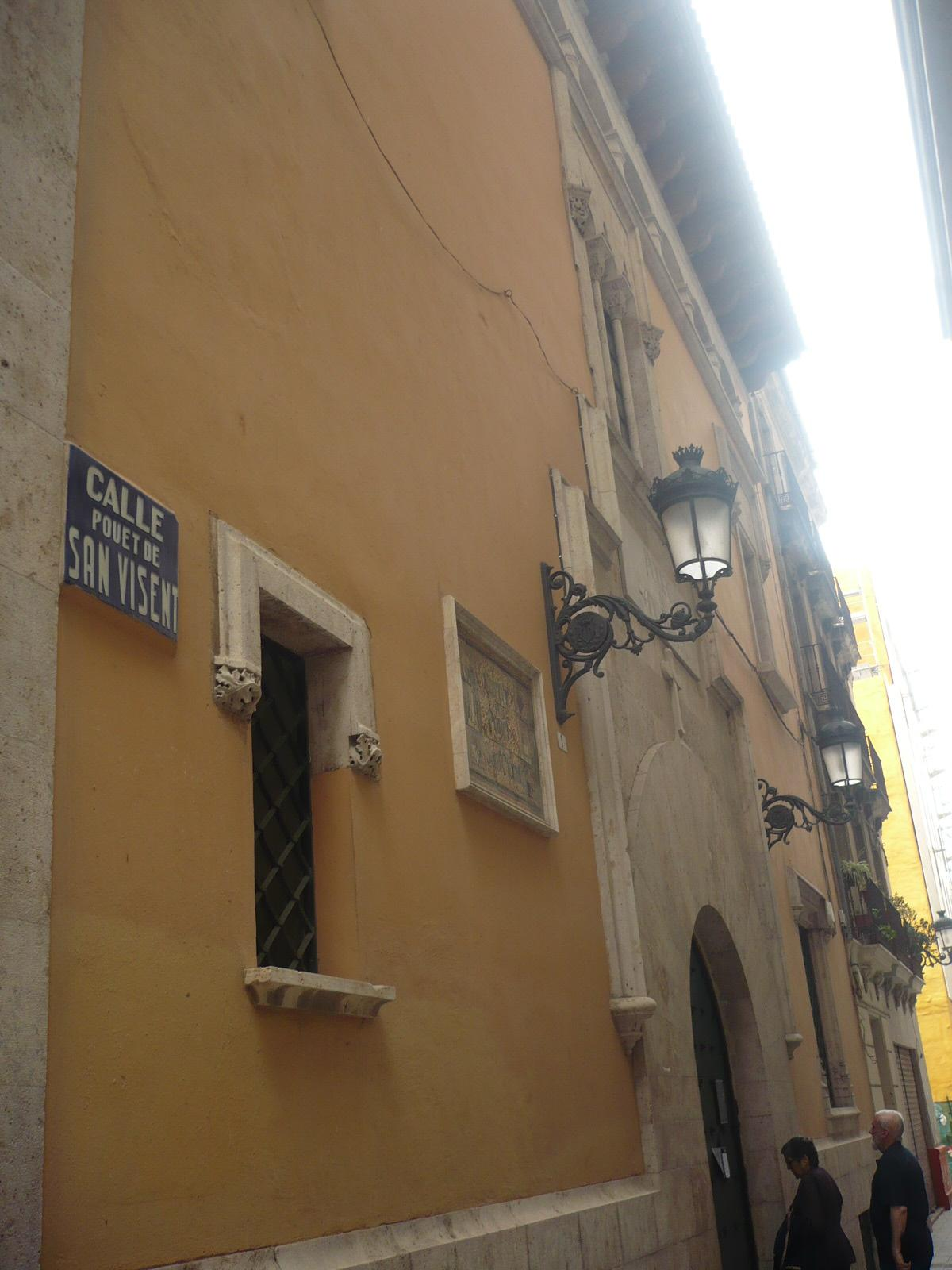 Calle y puerta de acceso al pouet de San Vicent en Valencia, donde el santo realizó un milagro con el agua del pozo durante una epidemia de cólera.